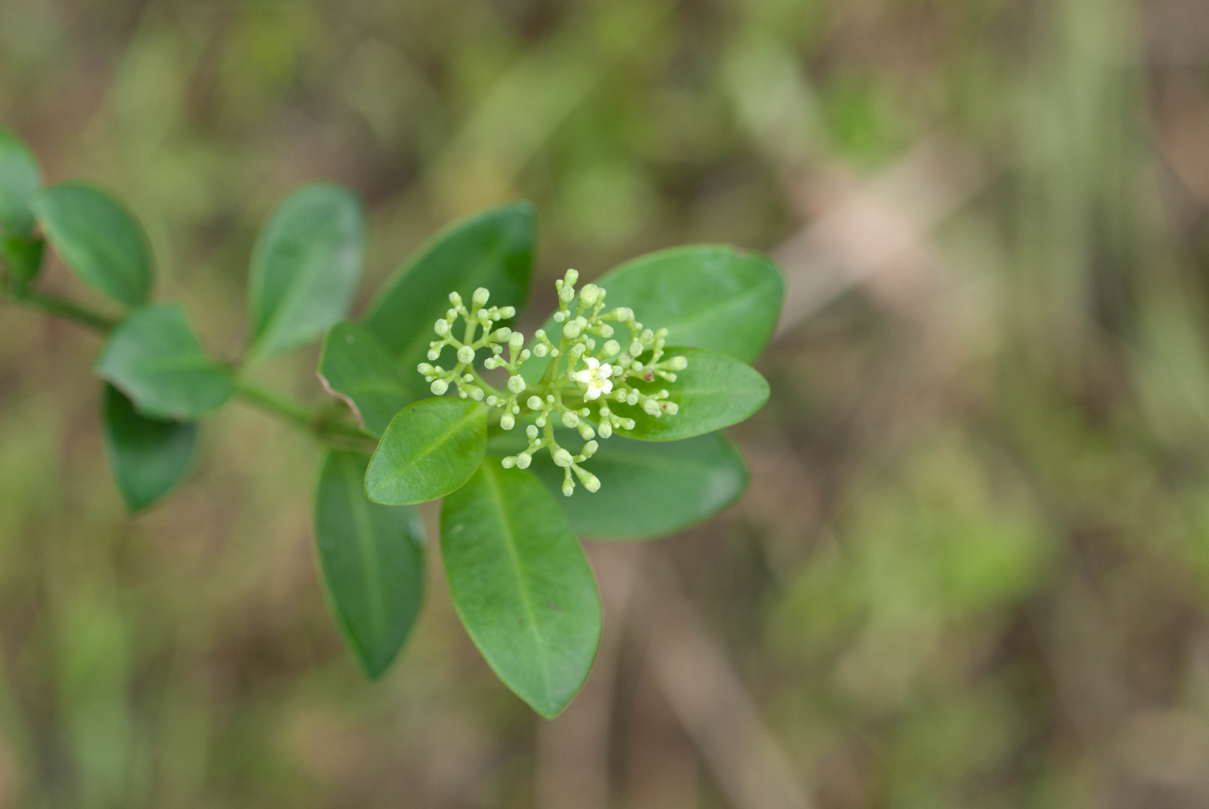 %u62CE%u58C1%u9F8D Psychotria serpens, L.